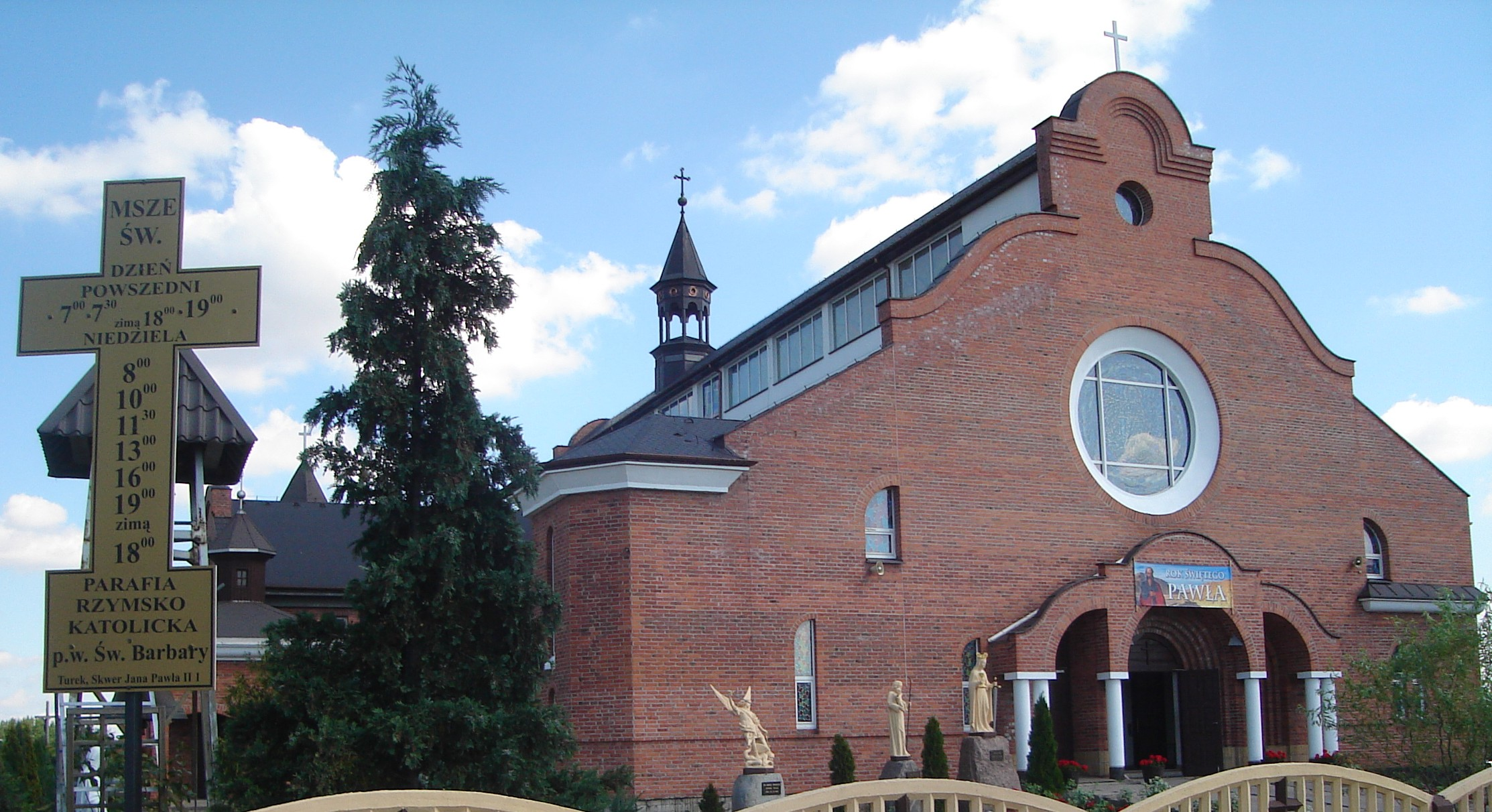 kościół św. Barbary w Turku